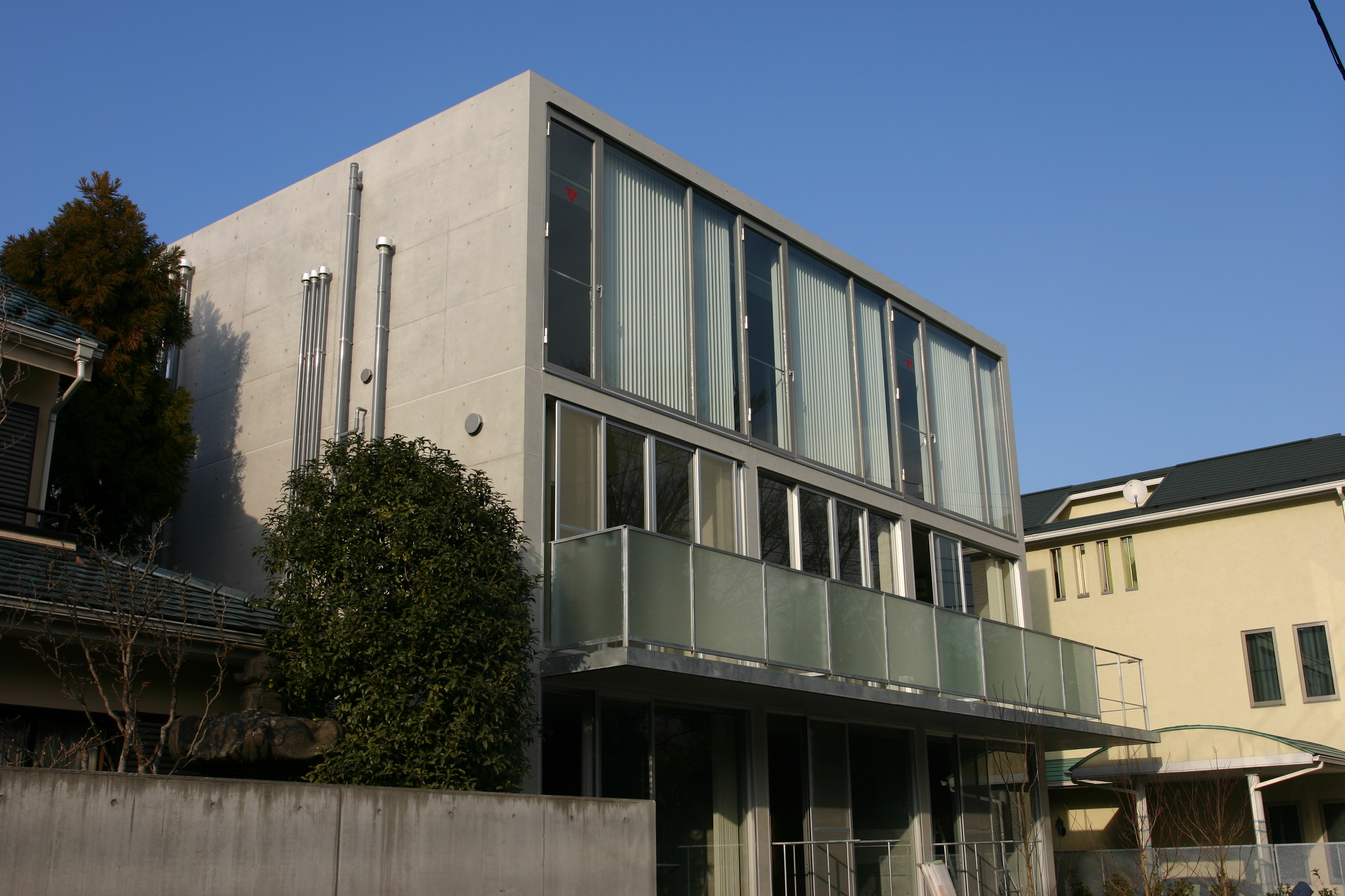 設計は、北山恒/architectureWORKSHOP。全7戸、地上2階・地下1階。